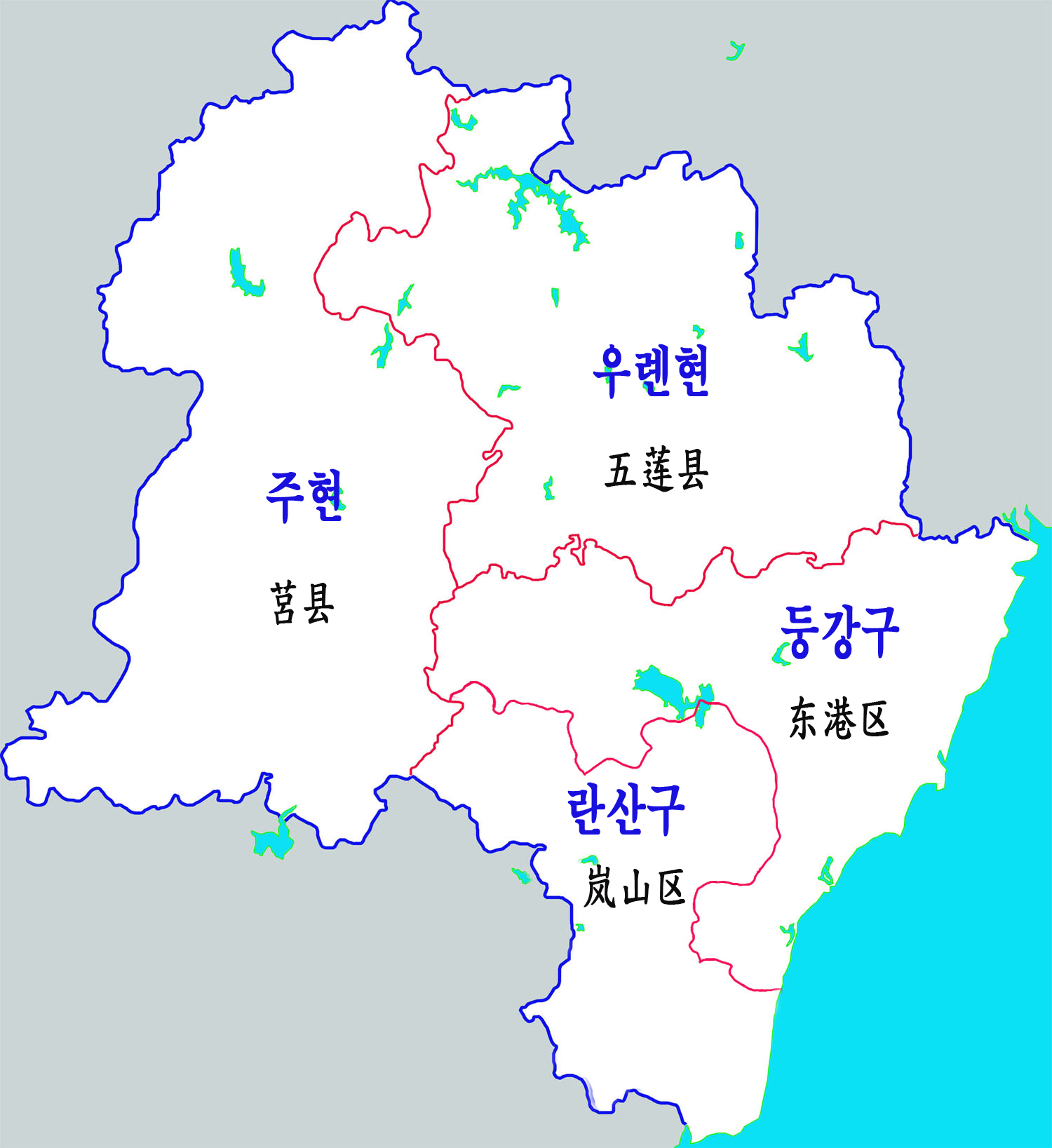 르자오시 현급구역도